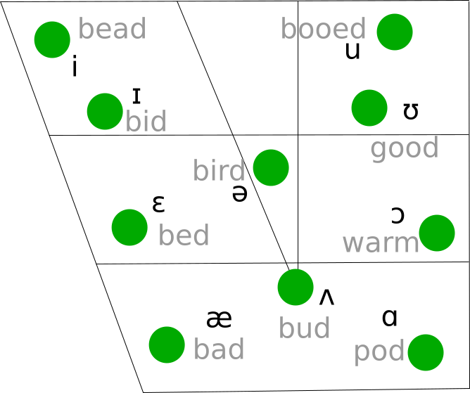 GA - system samogłosek